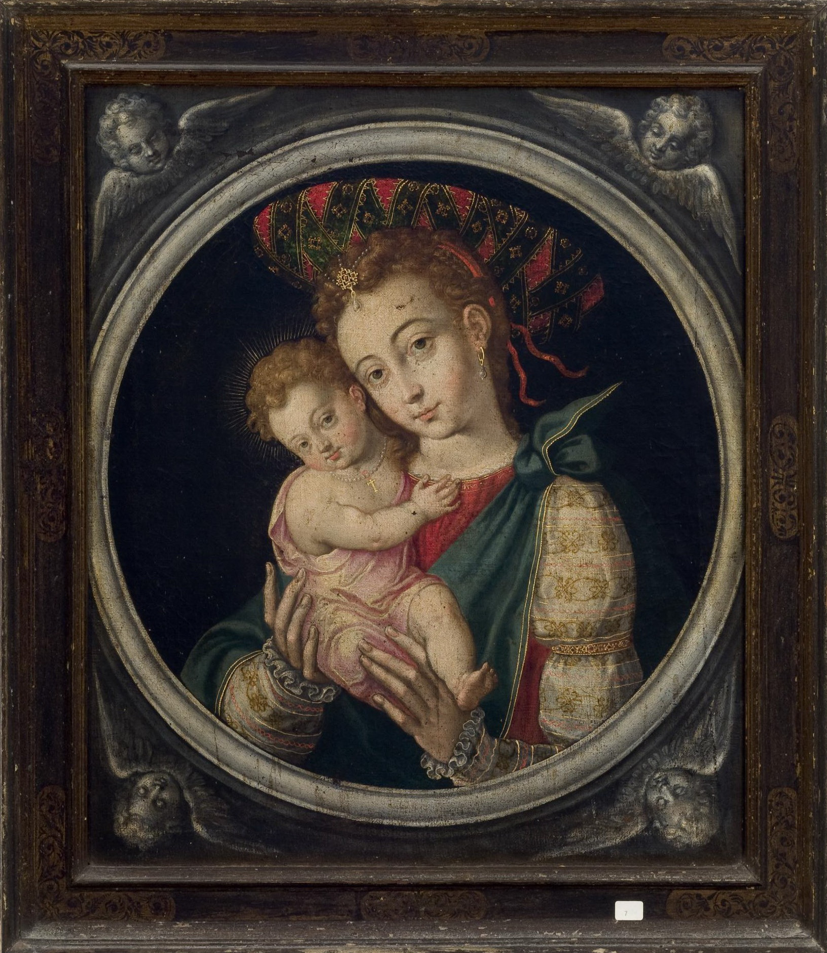 La Emperatriz Isabel de Portugal y con el Príncipe Felipe en brazos (futuro Felipe II de España), retrato a lo divino a la manera de la Virgen con el Niño. ¿Copia del original pintado en 1529 por António de Holanda, en Toledo?. Colección de la Fundación Casa de Medina Sidonia